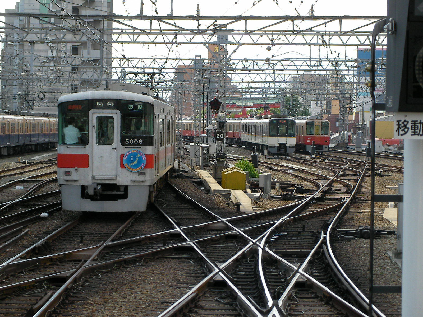 阪神尼崎駅の山陽5000系、近鉄9020系、阪神8000系です。